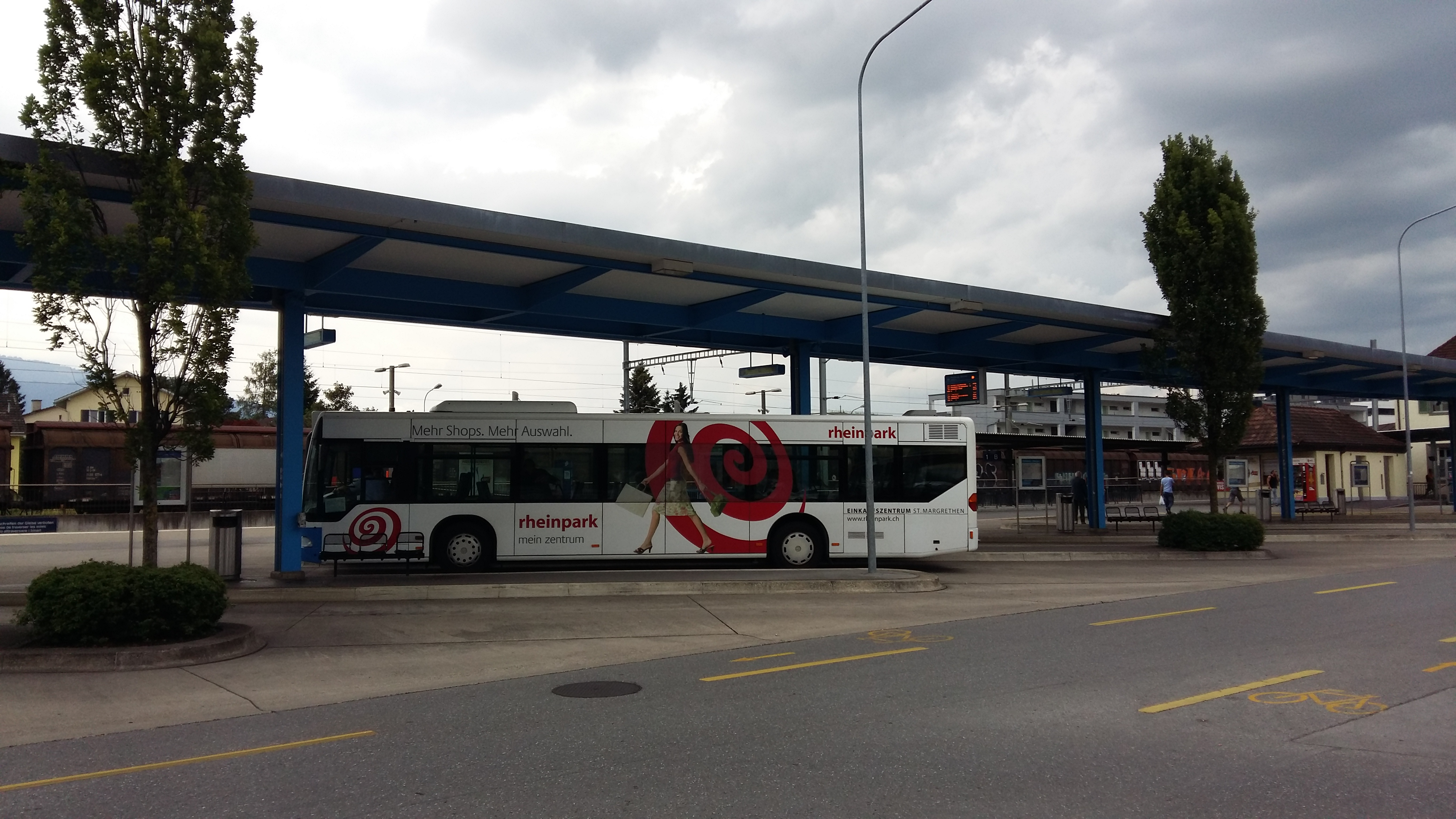 Der Busbahnhof Heerbrugg von Norden-Osten gesehen.